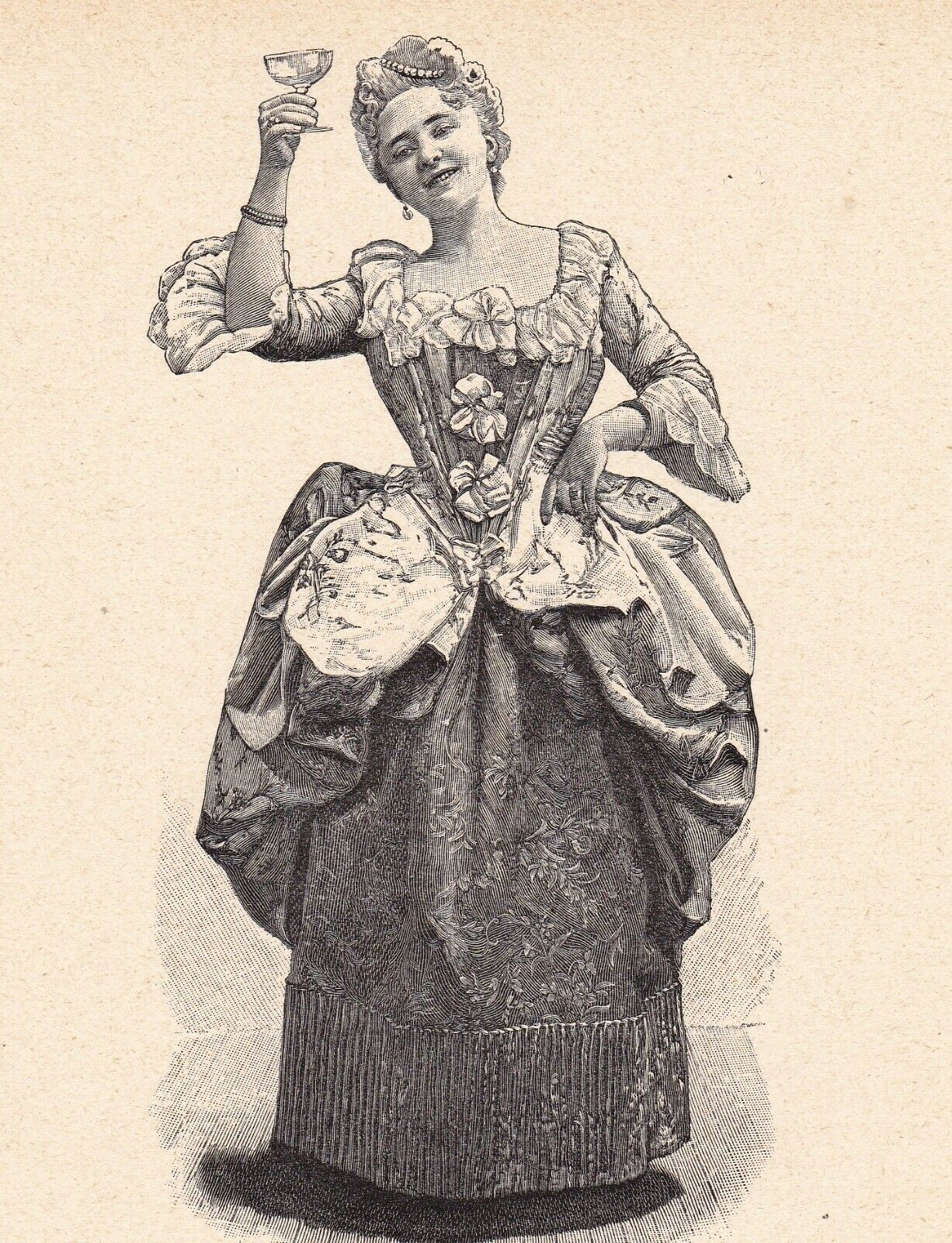 Portrait de Rose Delaunay pour l'Album d'Angelo Mariani avec une ode à la gloire de son cordial .